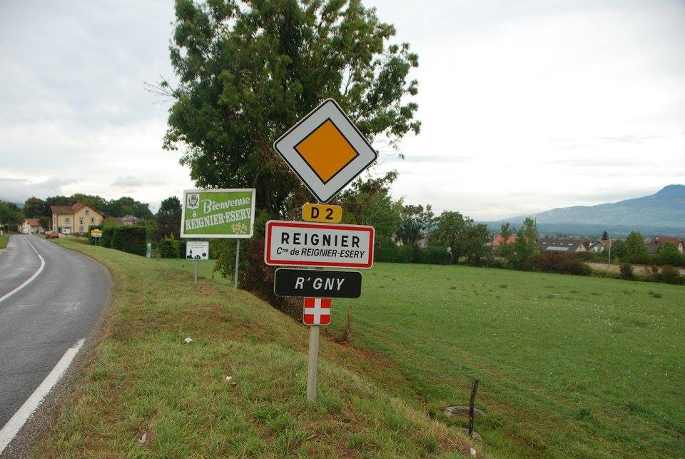 Panneau d'entrée d'agglomération en français et en arpitan à Reignier-Esery, Haute-Savoie.